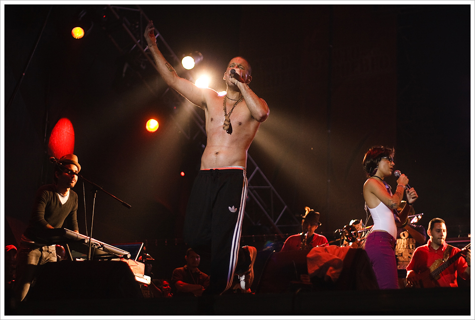 Concierto gratuito en el aniversario de Ali Primera